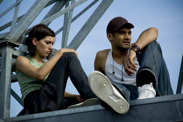 Pressefoto "Little Paris"